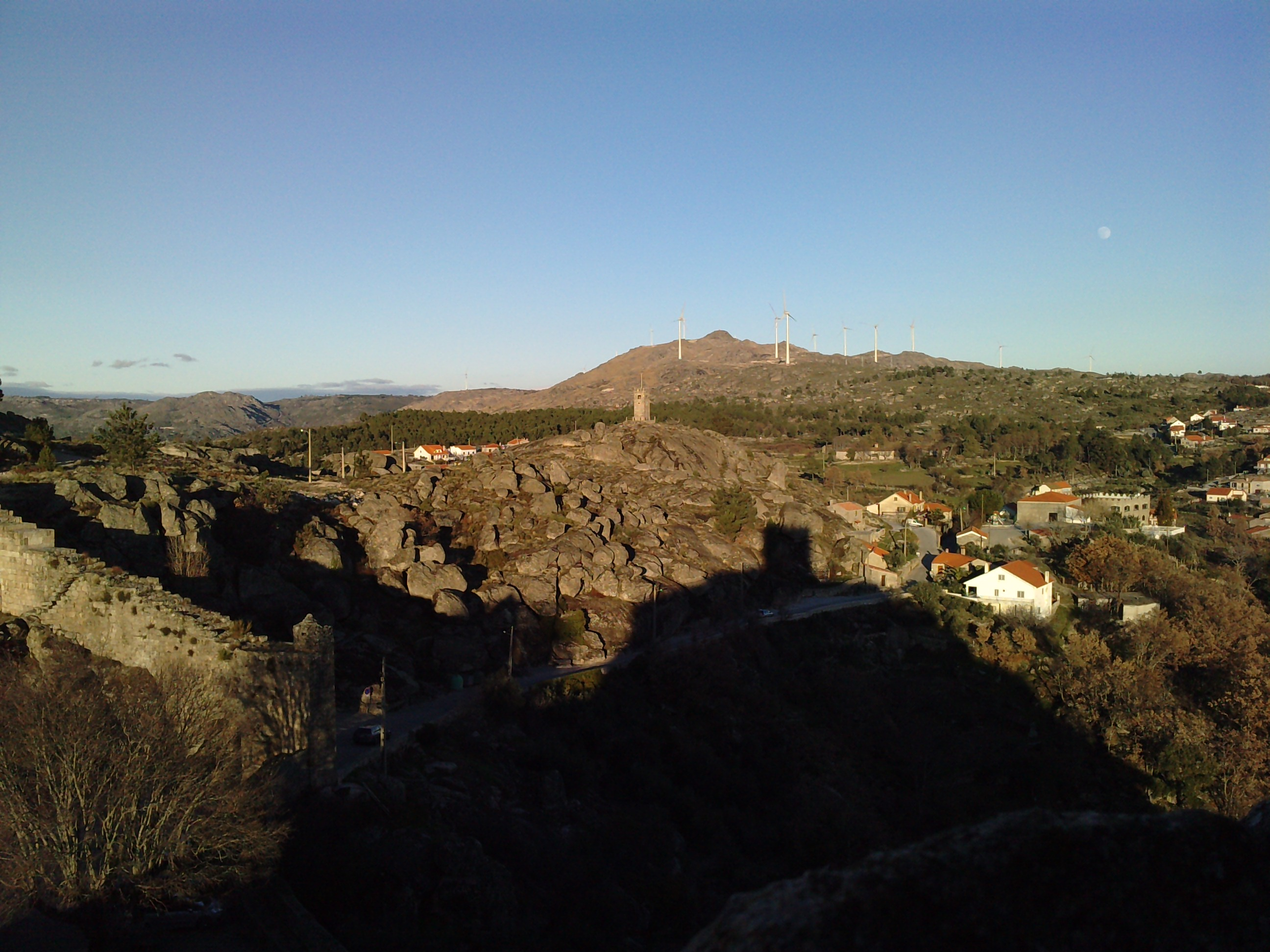 Marvão This file was uploaded for Wiki Loves Monuments in Portugal with the unique identifier 70735.